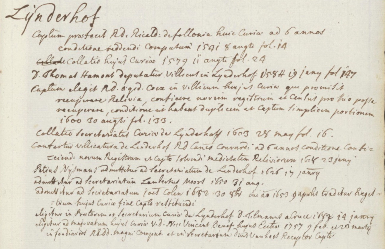 Pagina uit Compendium prothocollorum ab anno 1400, het repertorium van resoluties van het Onze-Lieve-Vrouwekapittel in Maastricht, van 1400 tot ca .1776. Collectie RHCL Maastricht, archief van het kapittel van Onze Lieve Vrouw te Maastricht, inv.nr. 14.B001 - 28-29.